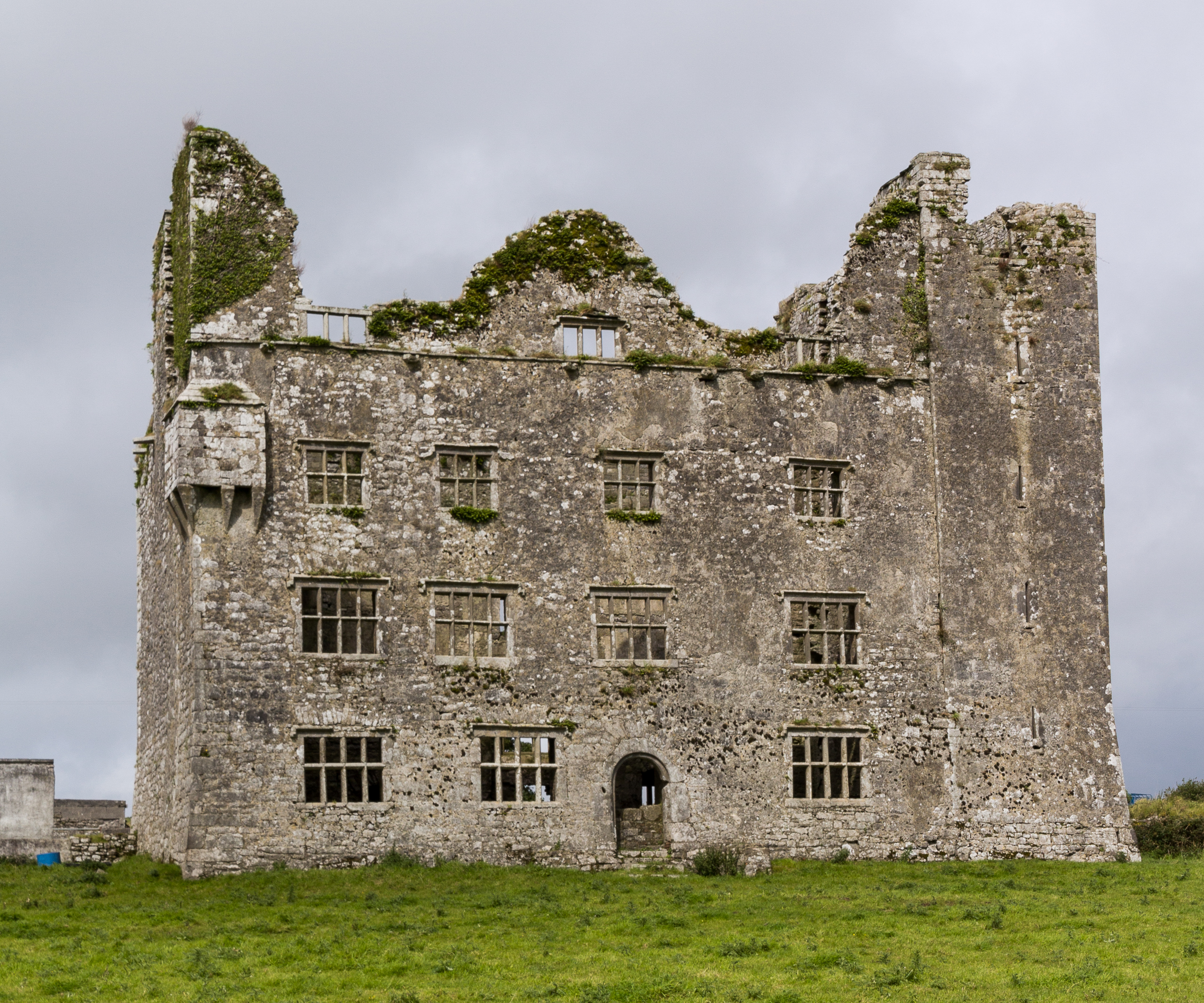 Leamaneh Castle, the Burren, Co. Clare IRL